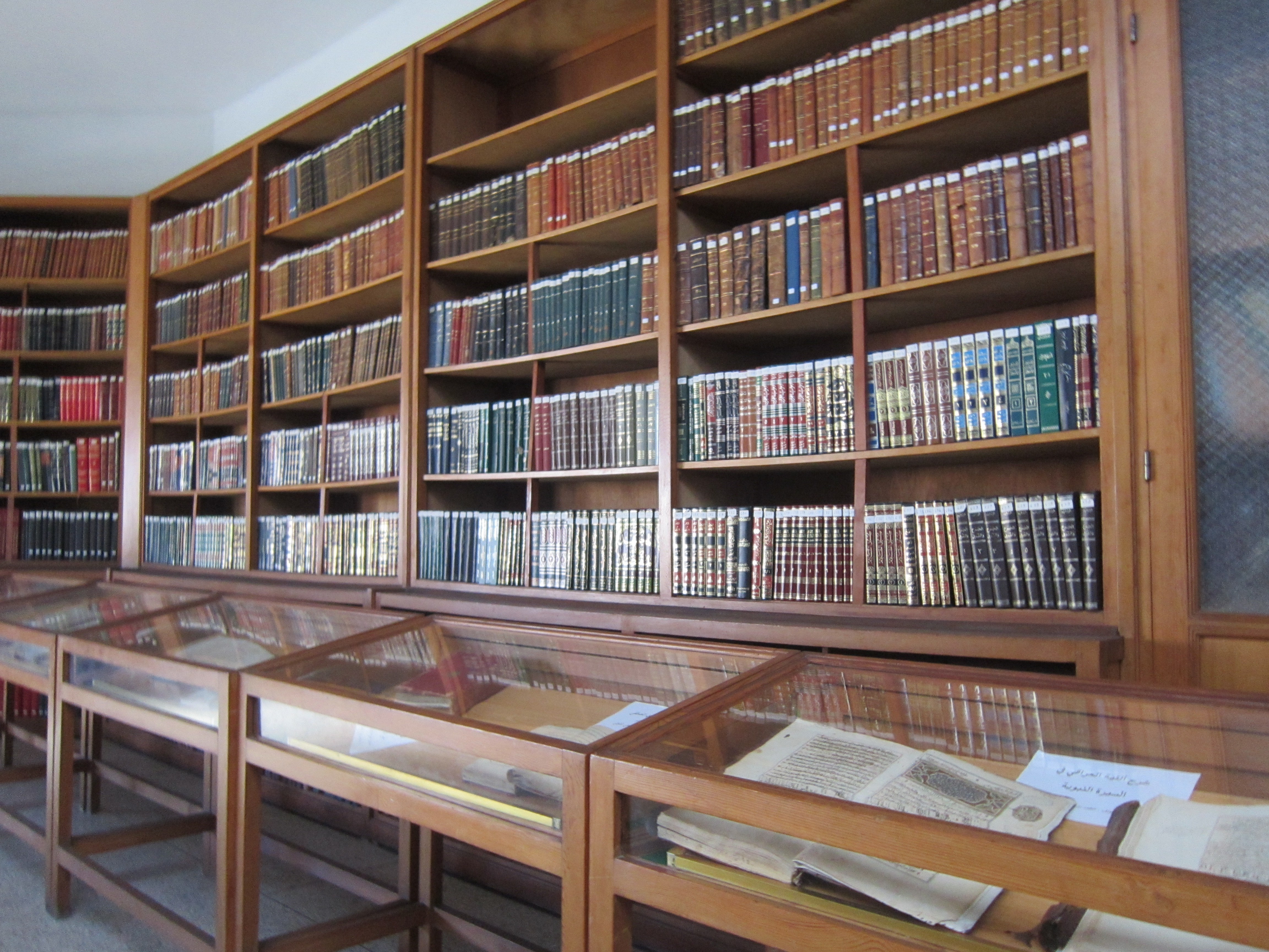 interieur bibliotheque sbihi